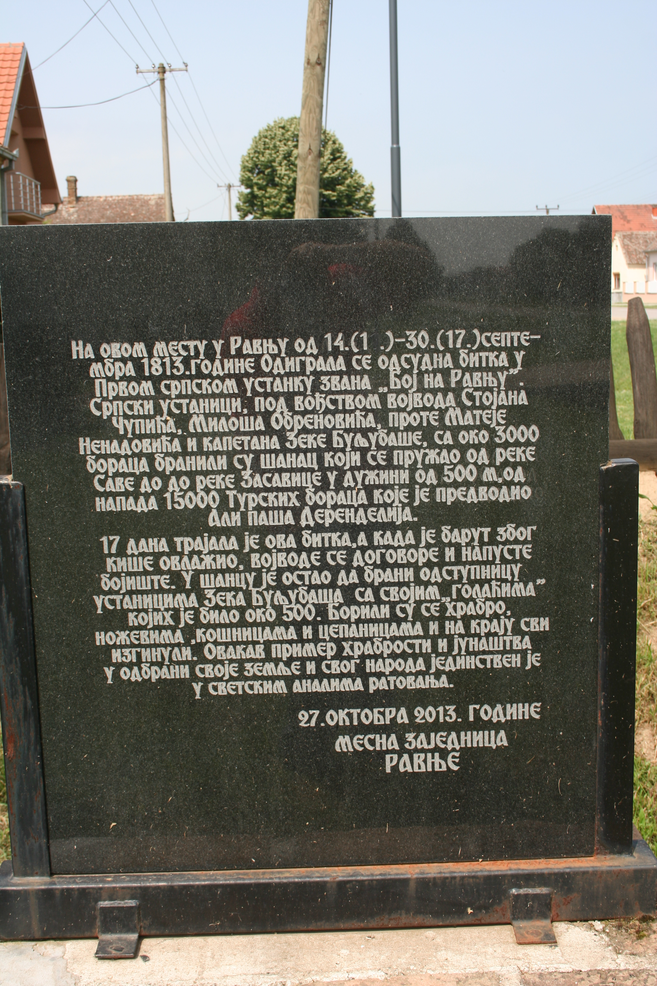 Spomen ploča u šancu, Ravnje